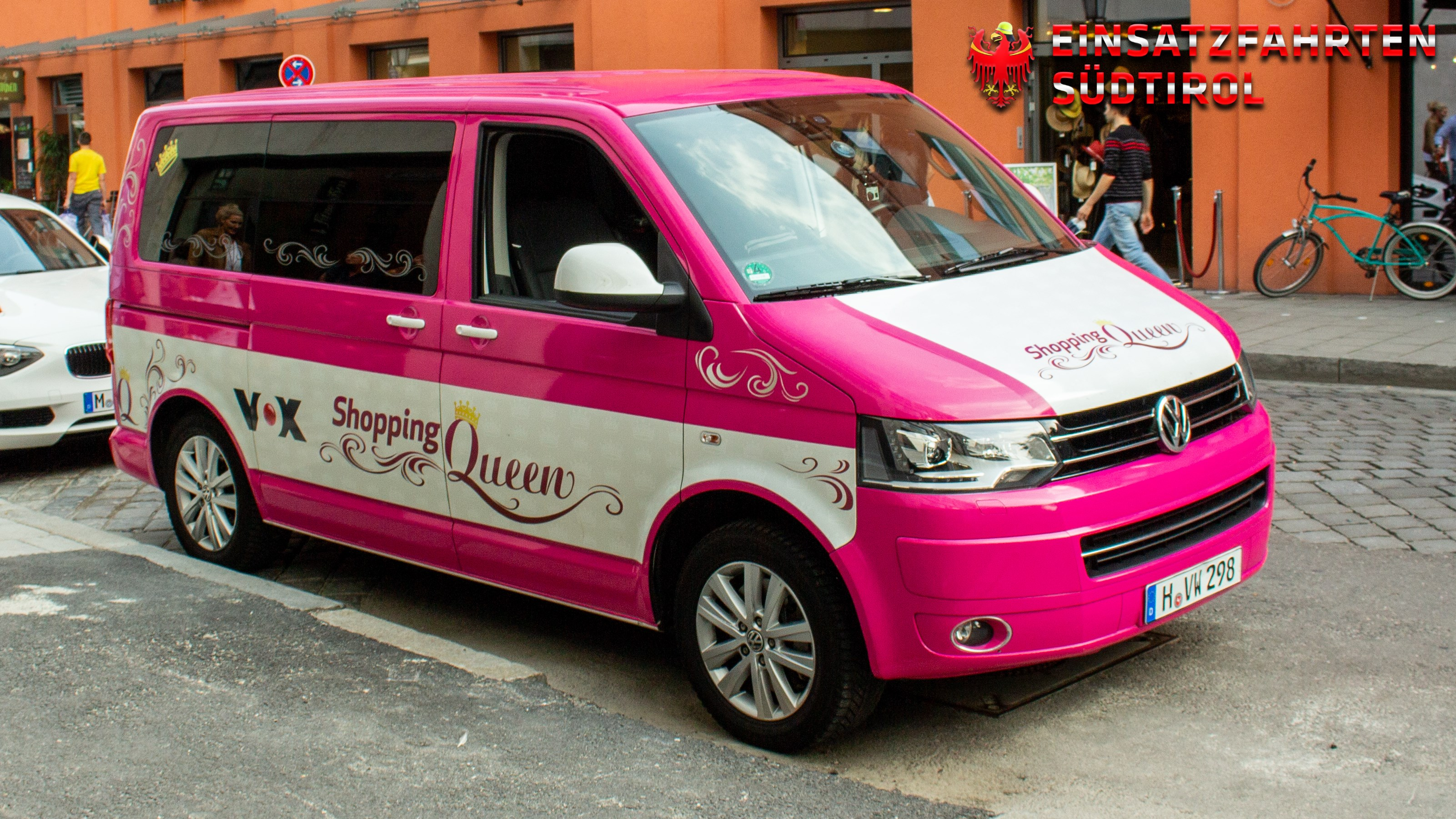 Der Shopping-Queen-Bus (Volkswagen T5), gesichtet vor der Zentrale von „Constantin Film“ in München.